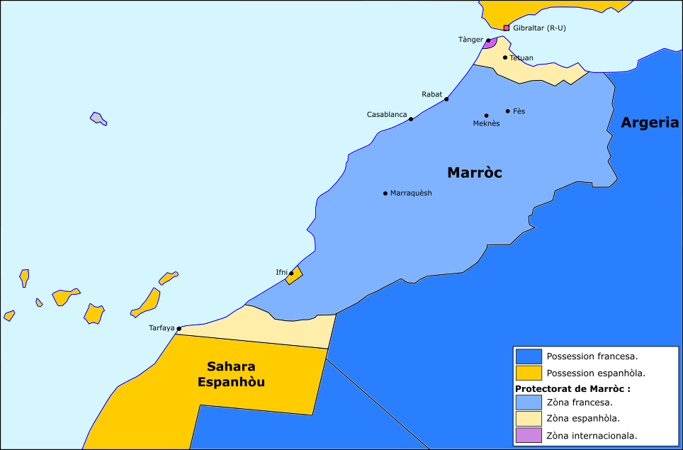 Partiment de Marròc entre França e Espanha.